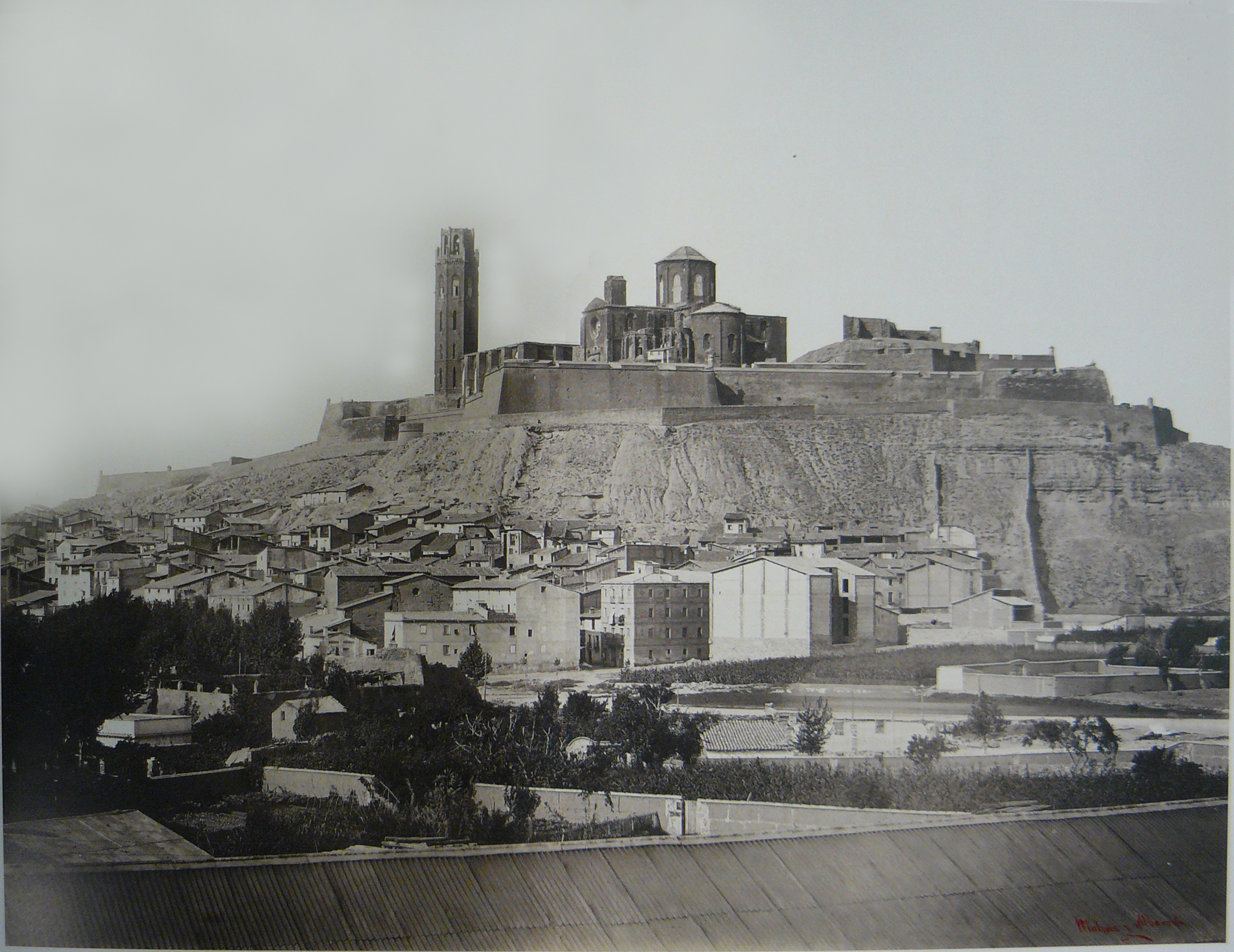 foto moliné 7